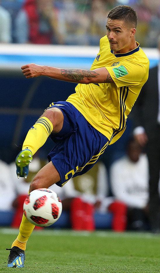 Сборная Швеции зрелищно вышла в четвертьфинал ЧМ-2018